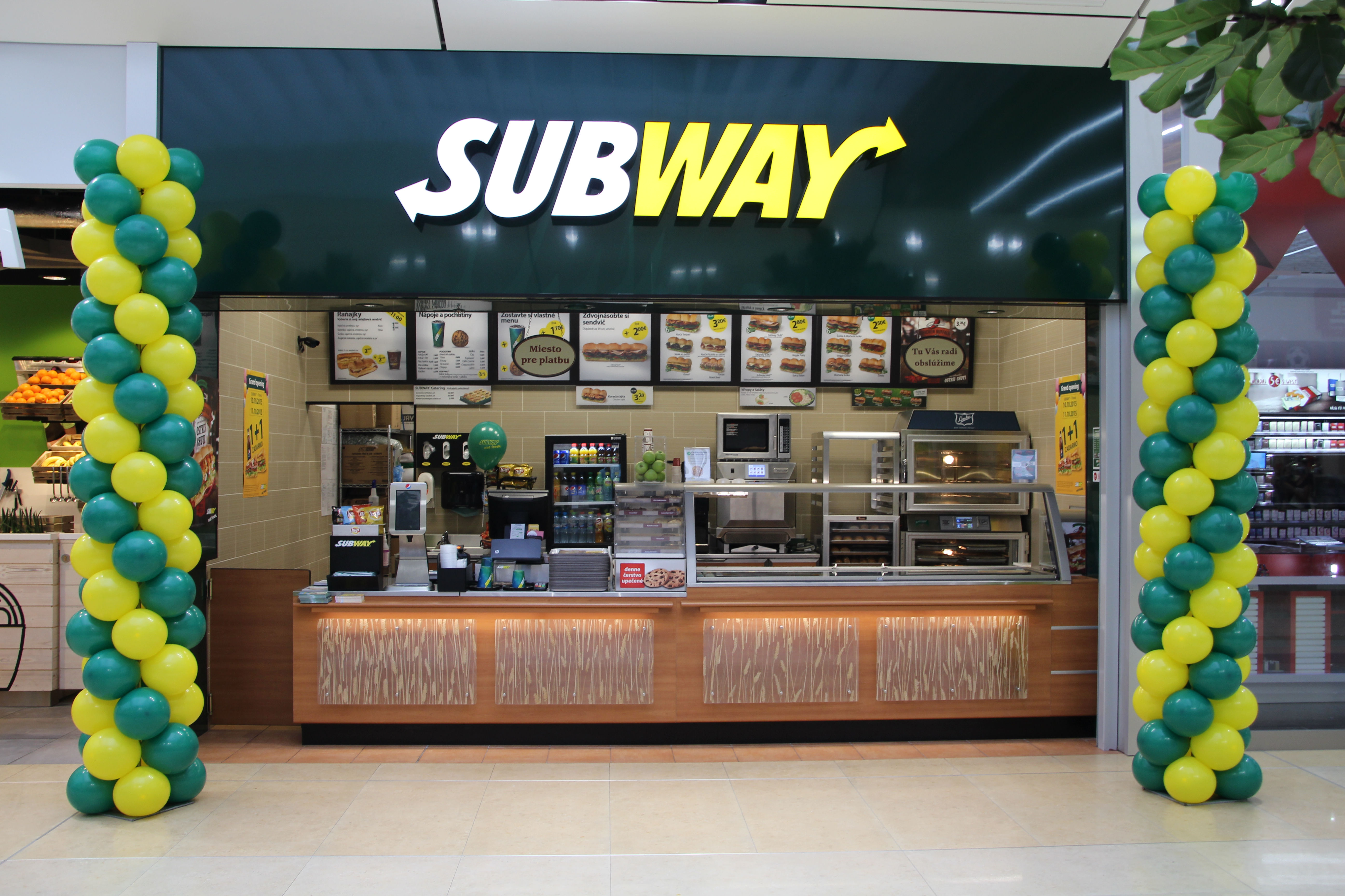 Reštaurácia SUBWAY® City Arena